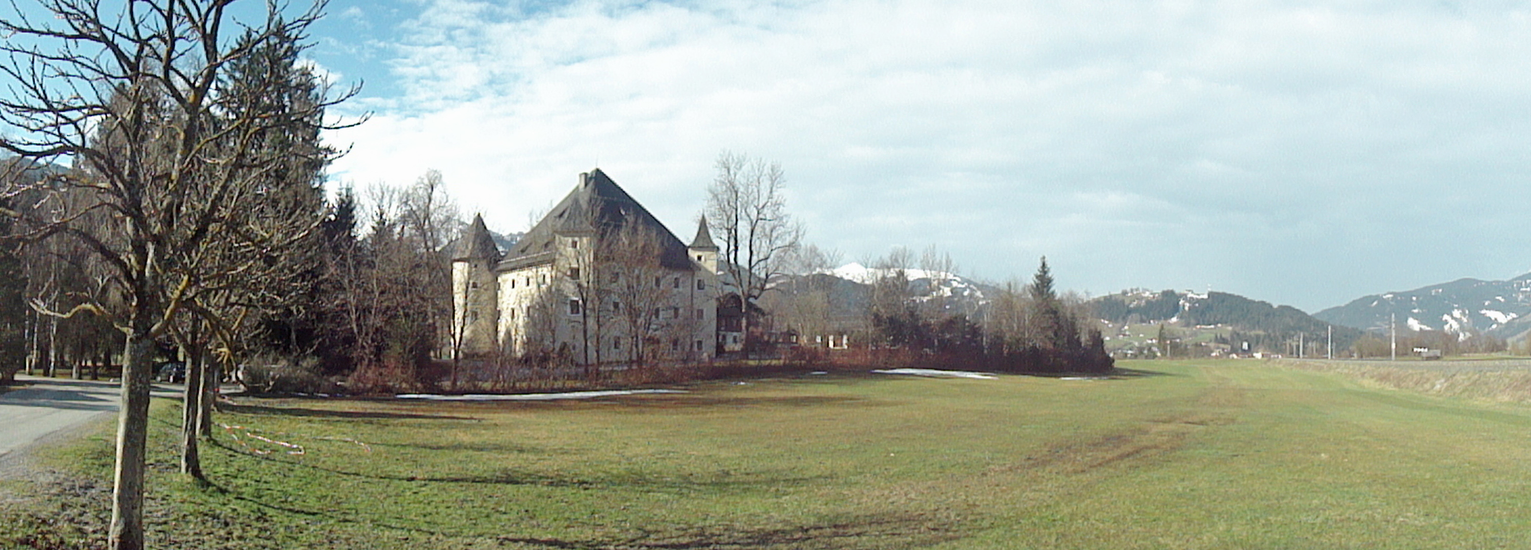 Schloss Tandalier, denkmalgeschütztes Objekt in Radstadt.